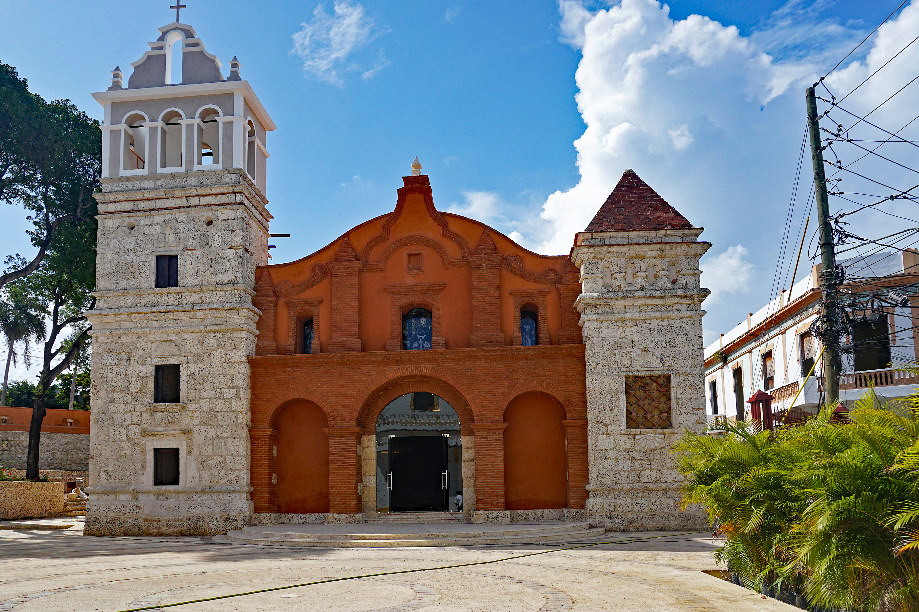 Iglesia de Santa Bárbara restaurada en 2019, Ciudad Colonial Santo Domingo